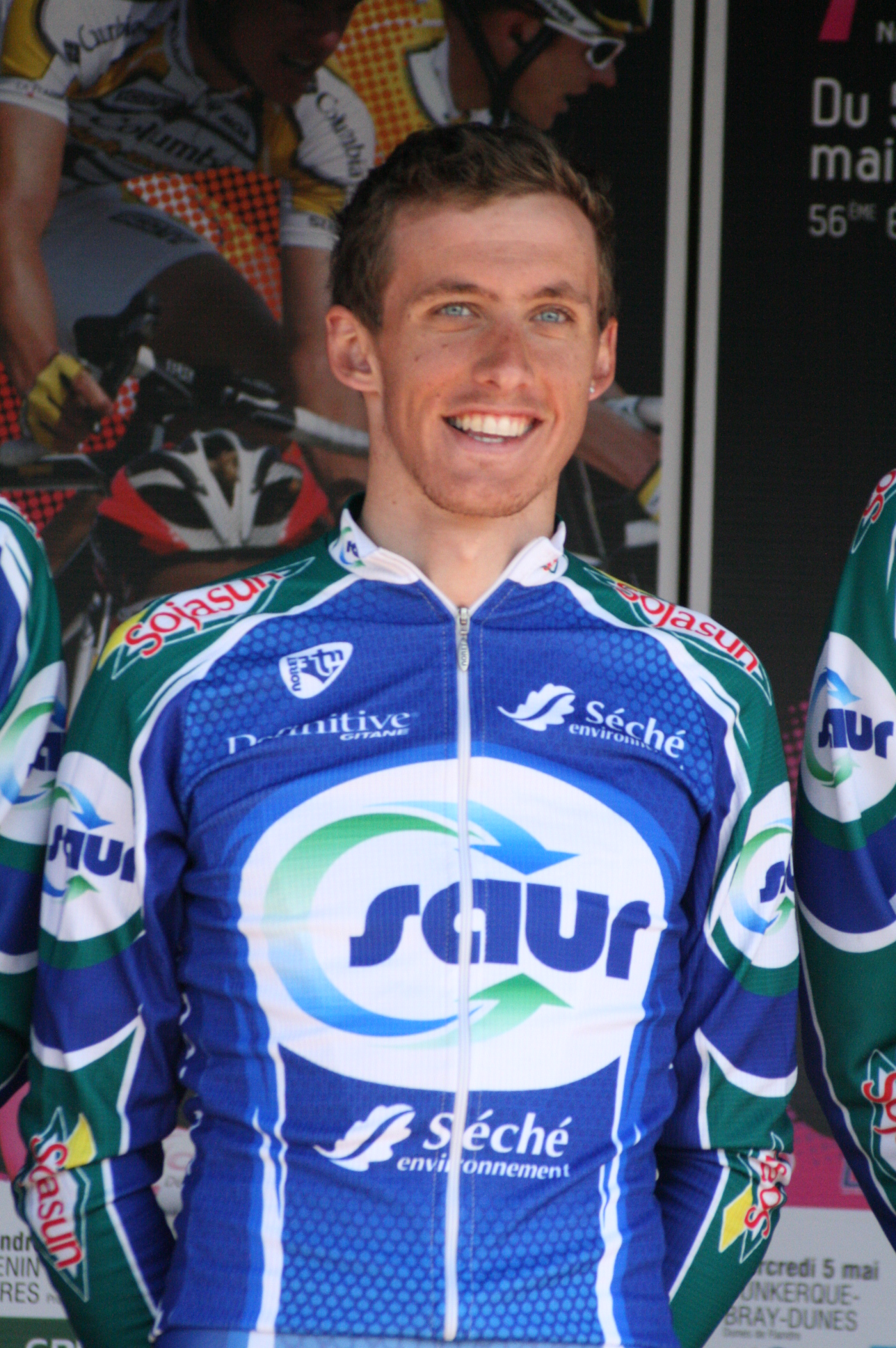 Jérôme Coppel lors de la présentation des équipes des 4 jours de Dunkerque 2010